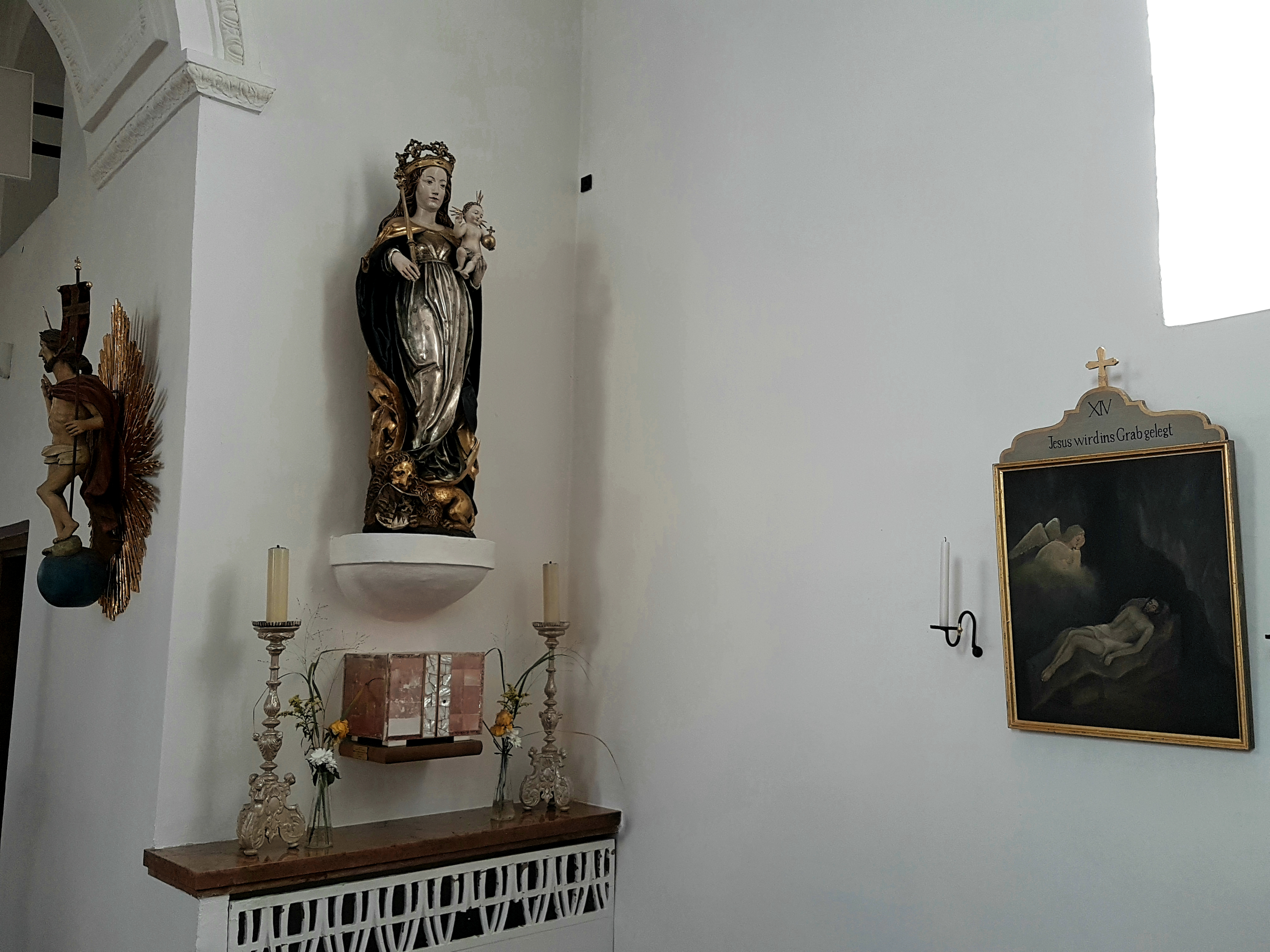 St. Peter (Hadern), rechte Langhaus-Seite mit Seitenaltar.